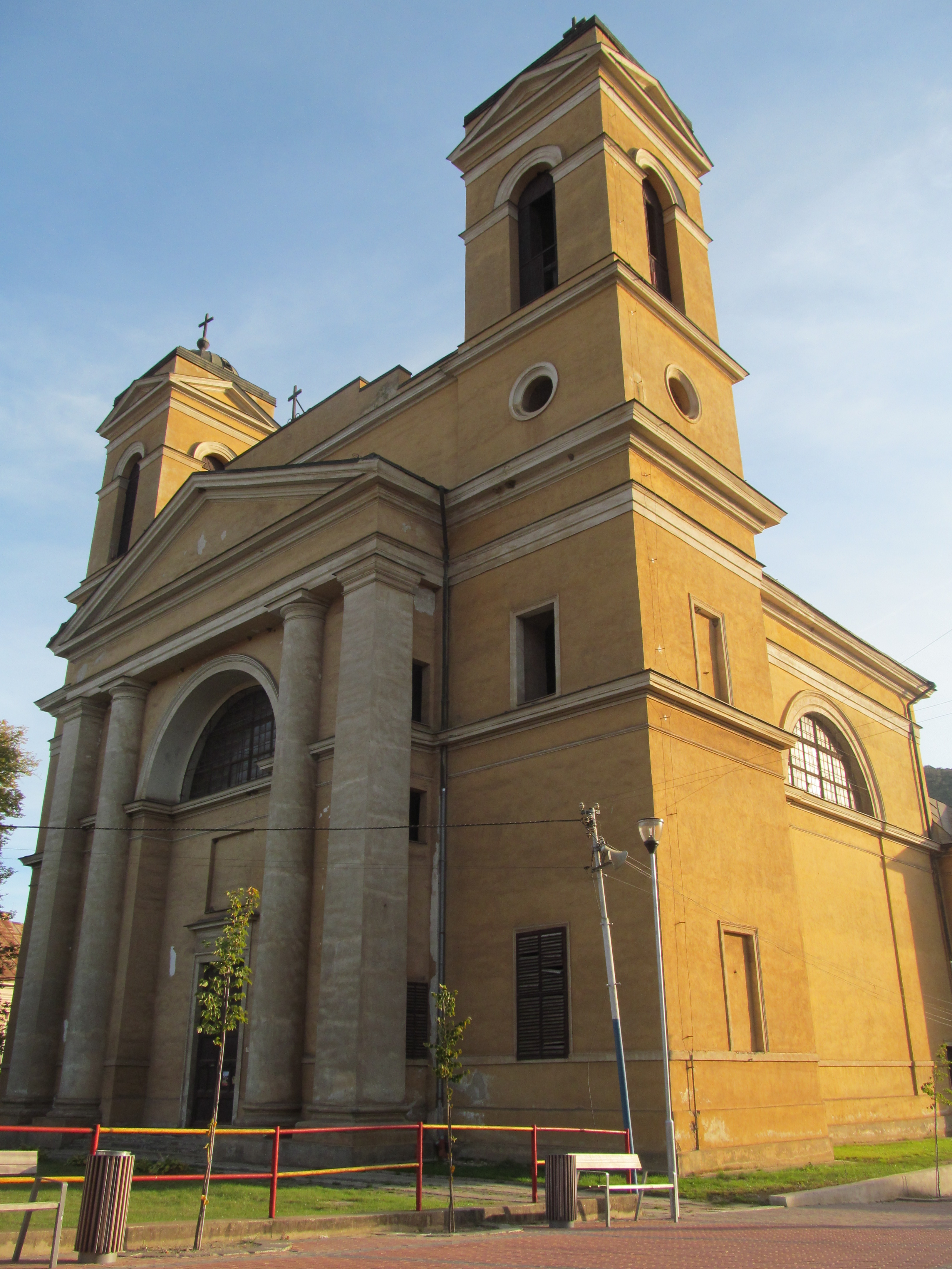 Kostol